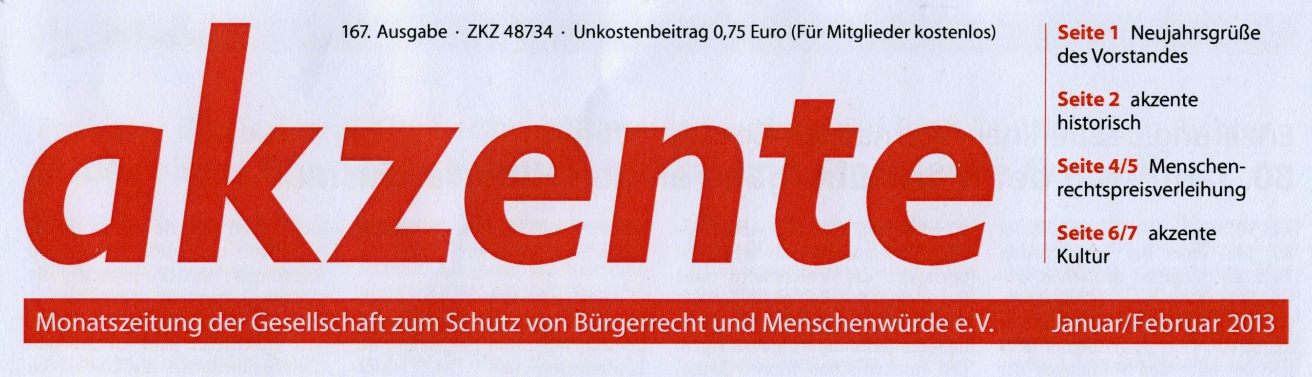 Kopf der Monatszeitschrift "Akzente"